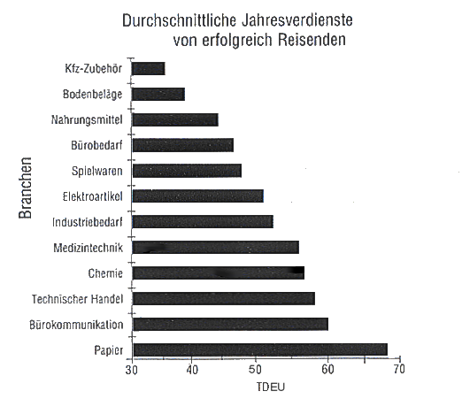 Einkommenszahlen im Verkauf allgemein. Grafik aus Fachzeitschrift zahlenmäßig überarbeitet, in Euro umgerechnet, neu skaliert und beschriftet. Bo 21:34, 16. Jul 2004 (CEST)